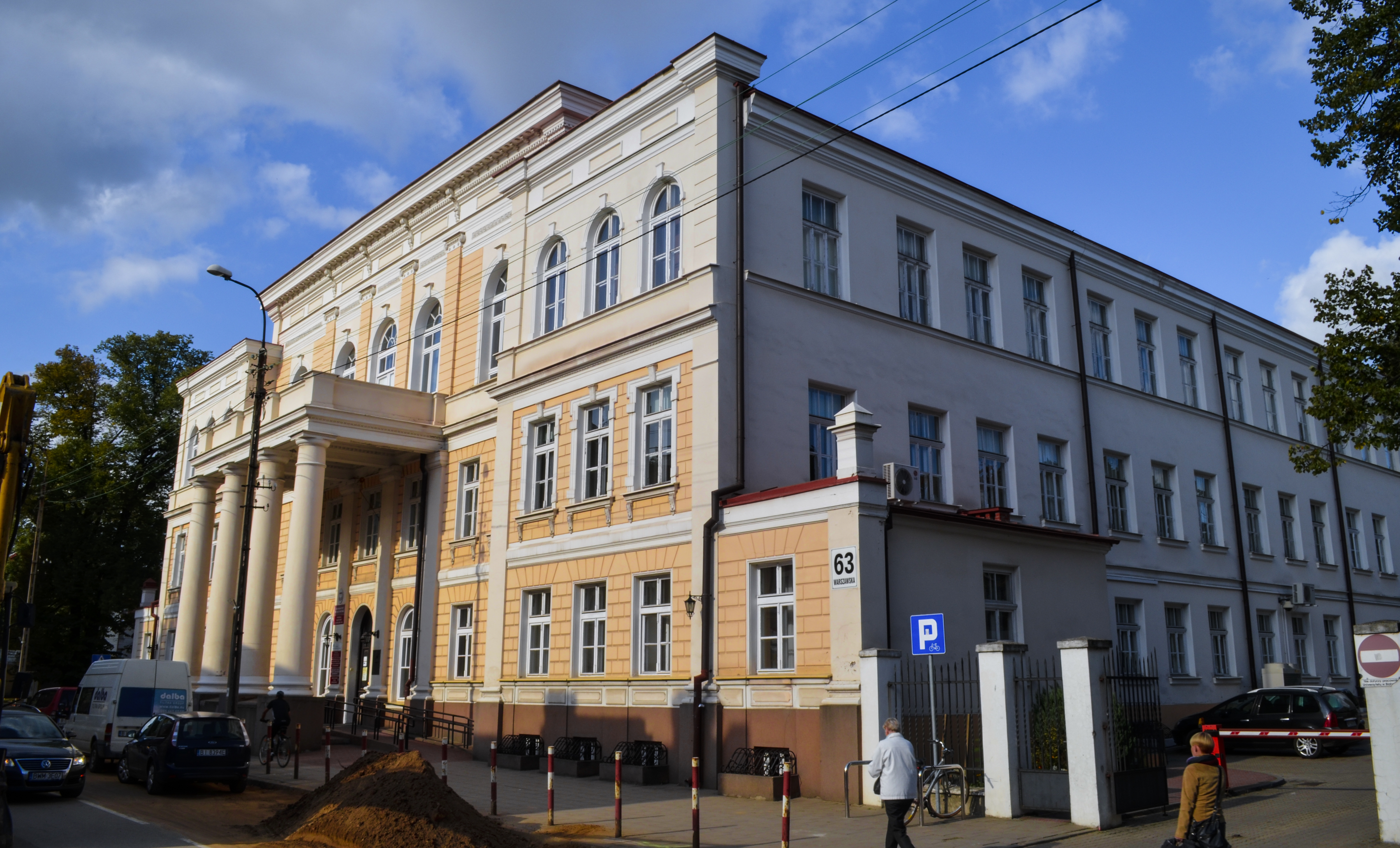 Białystok, ul. Warszawska 63 - dom / "Kamienica pana Trębickiego", obecnie Wydział Ekonomiczny Uniwersytetu w Białymstoku. Należała w przeszłości do rodzin Commichau i Moes (zabytek nr A-150 z 30.12.1975)